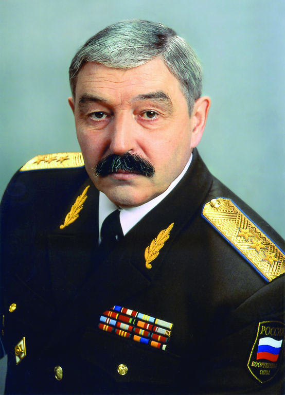 Командующий Воздушно-десантными войсками (декабрь 1996-го - сентябрь 2003 гг.) генерал-полковник Шпак Георгий Иванович